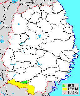 岩手県気仙郡の範囲（緑：住田町）